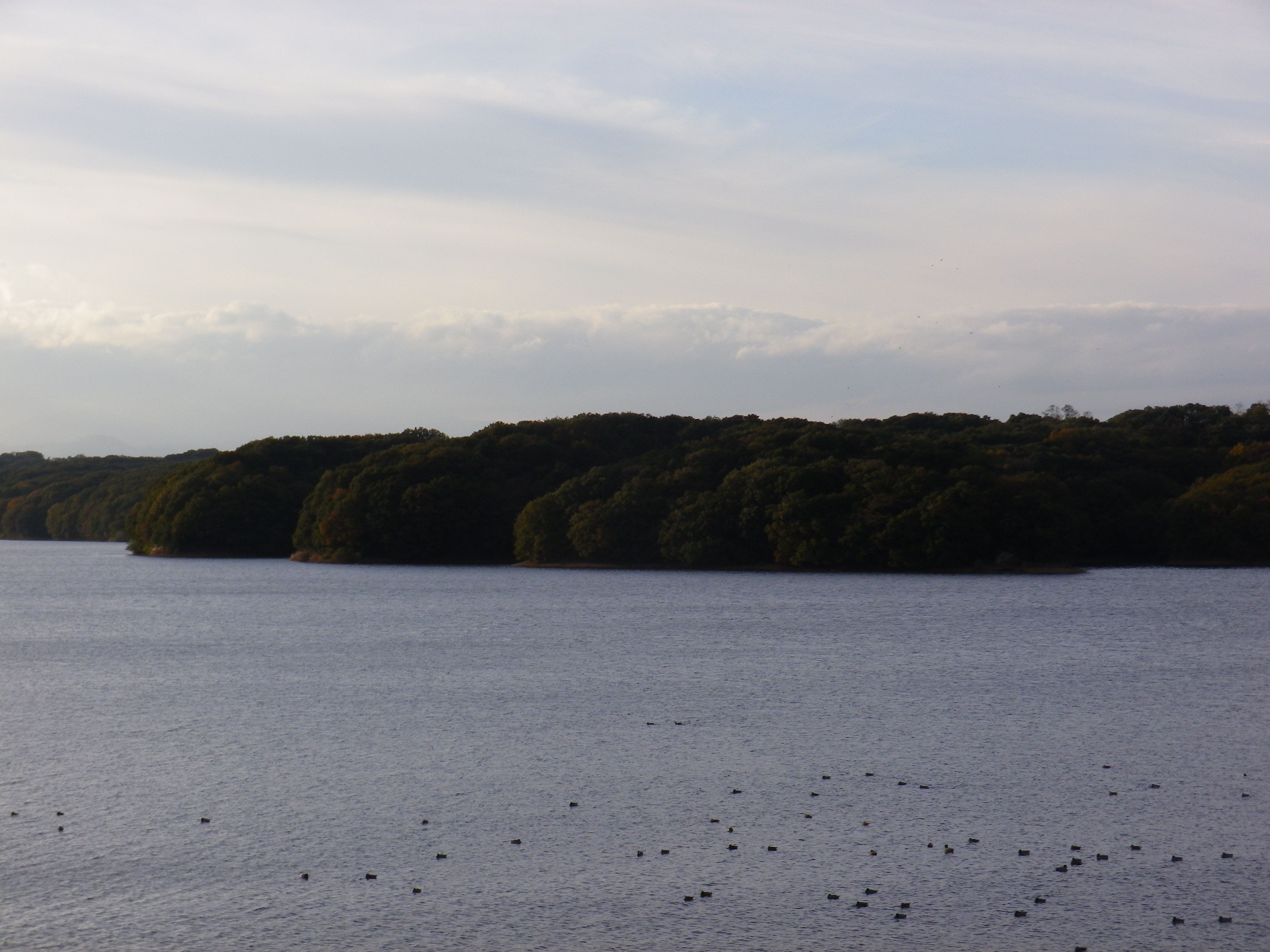 狭山湖堤防上からの遠景